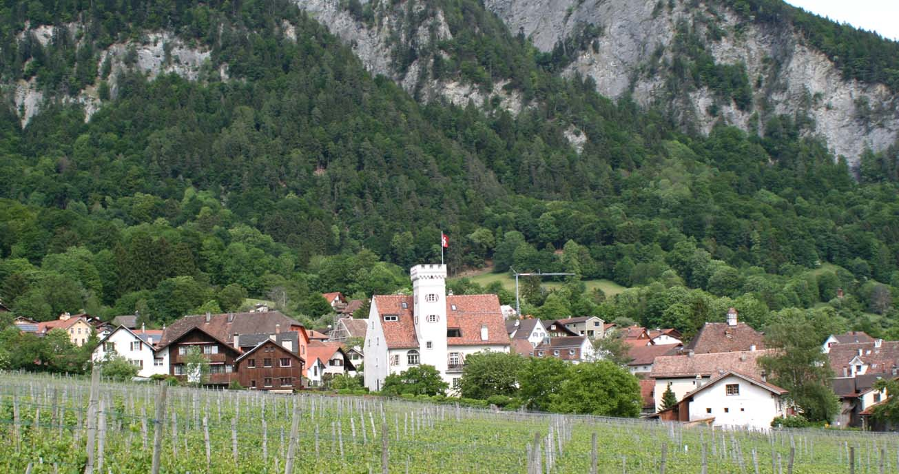 Malans